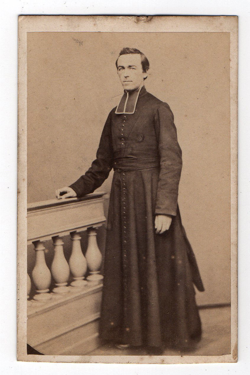 Ecclésiastique français, vers 1880. Photographie prise à Auxerre chez Brisson. Il porte un rabat à la française.